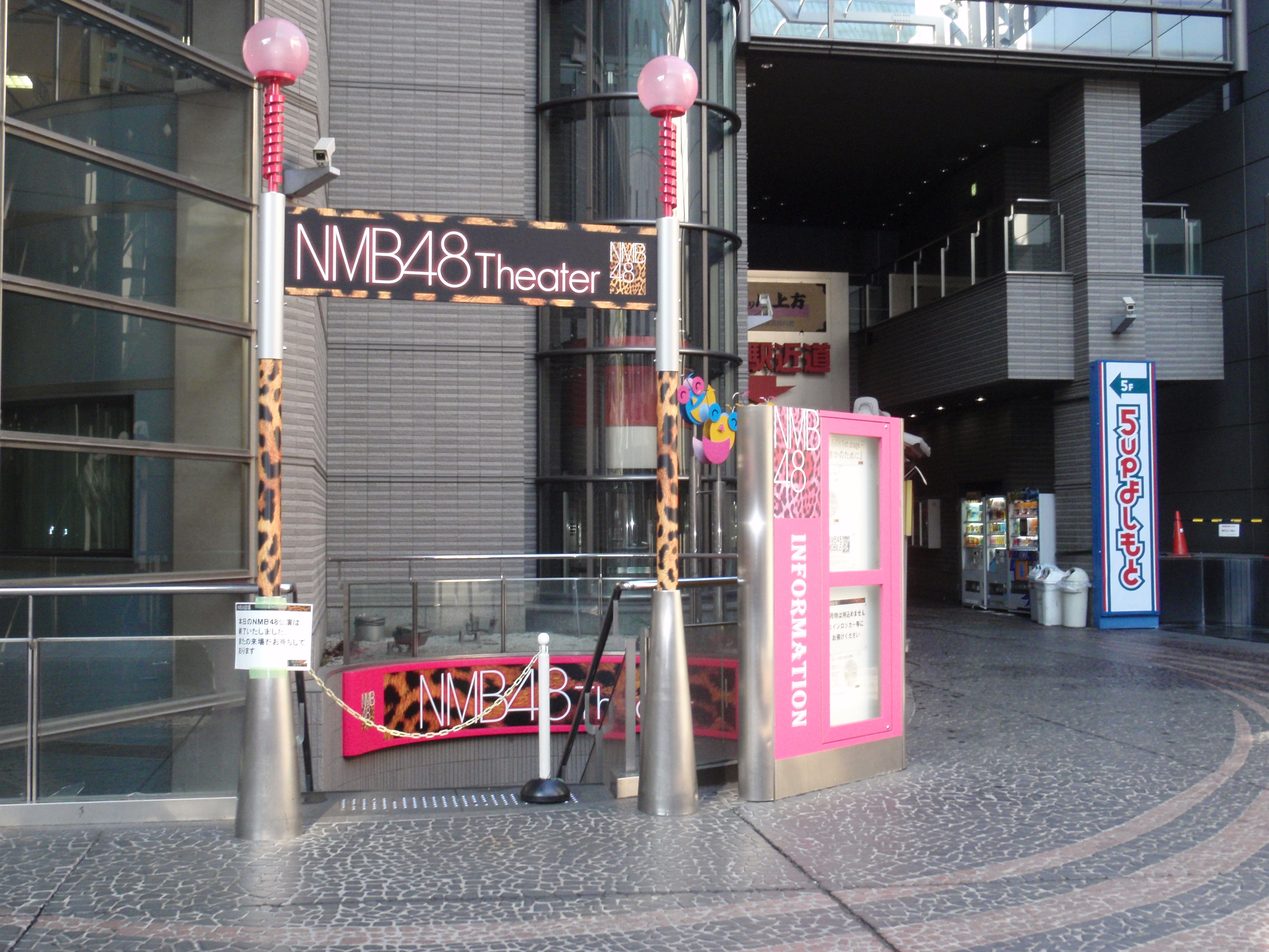 YES-NAMBAビル前、NMB48劇場の入口。大阪市中央区難波千日前。